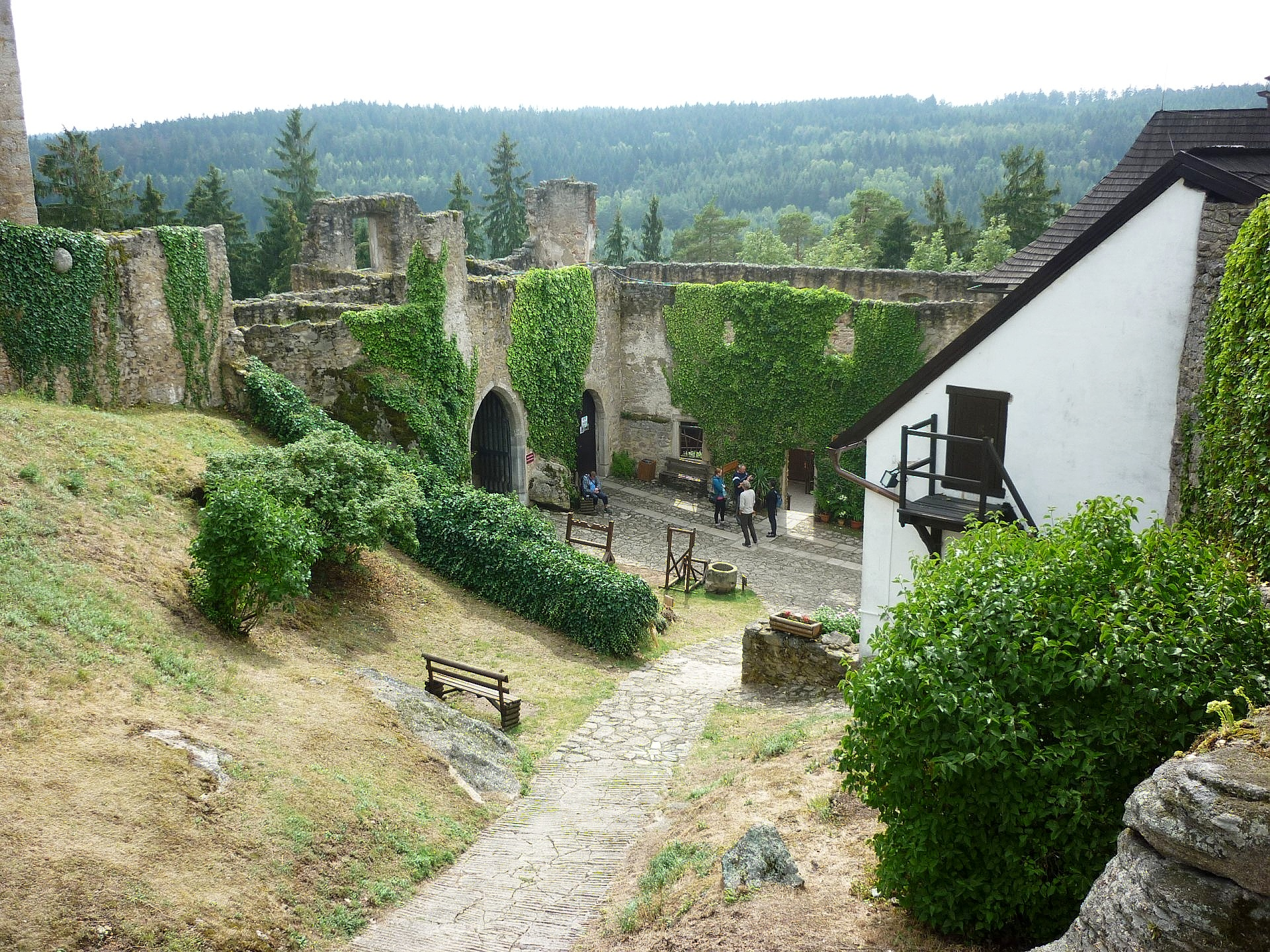 Hrad Landštejn